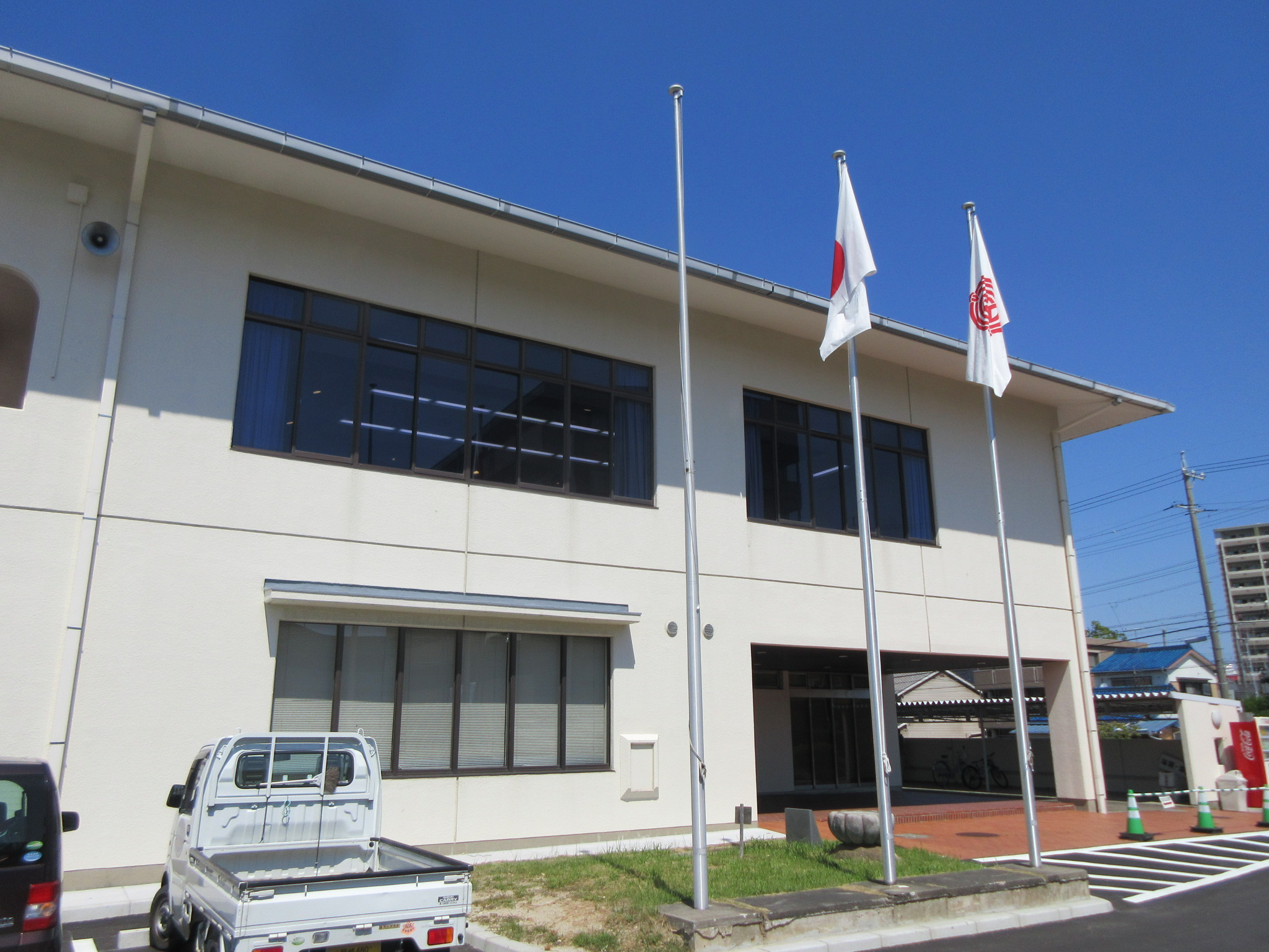 岡崎市南部市民センター分館（岡崎市羽根西新町）